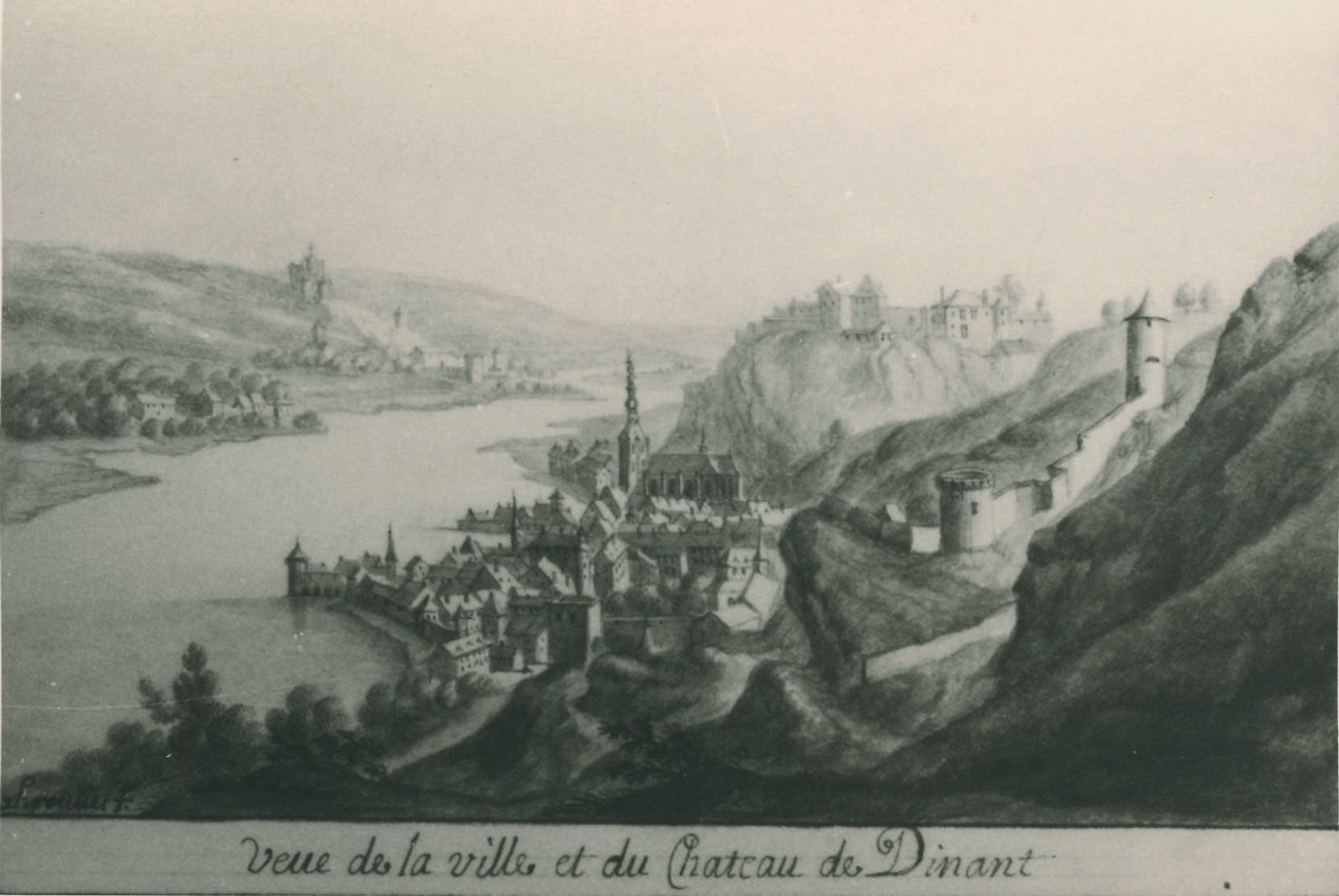 Ville et château de Dinant, Joseph Xhrouet